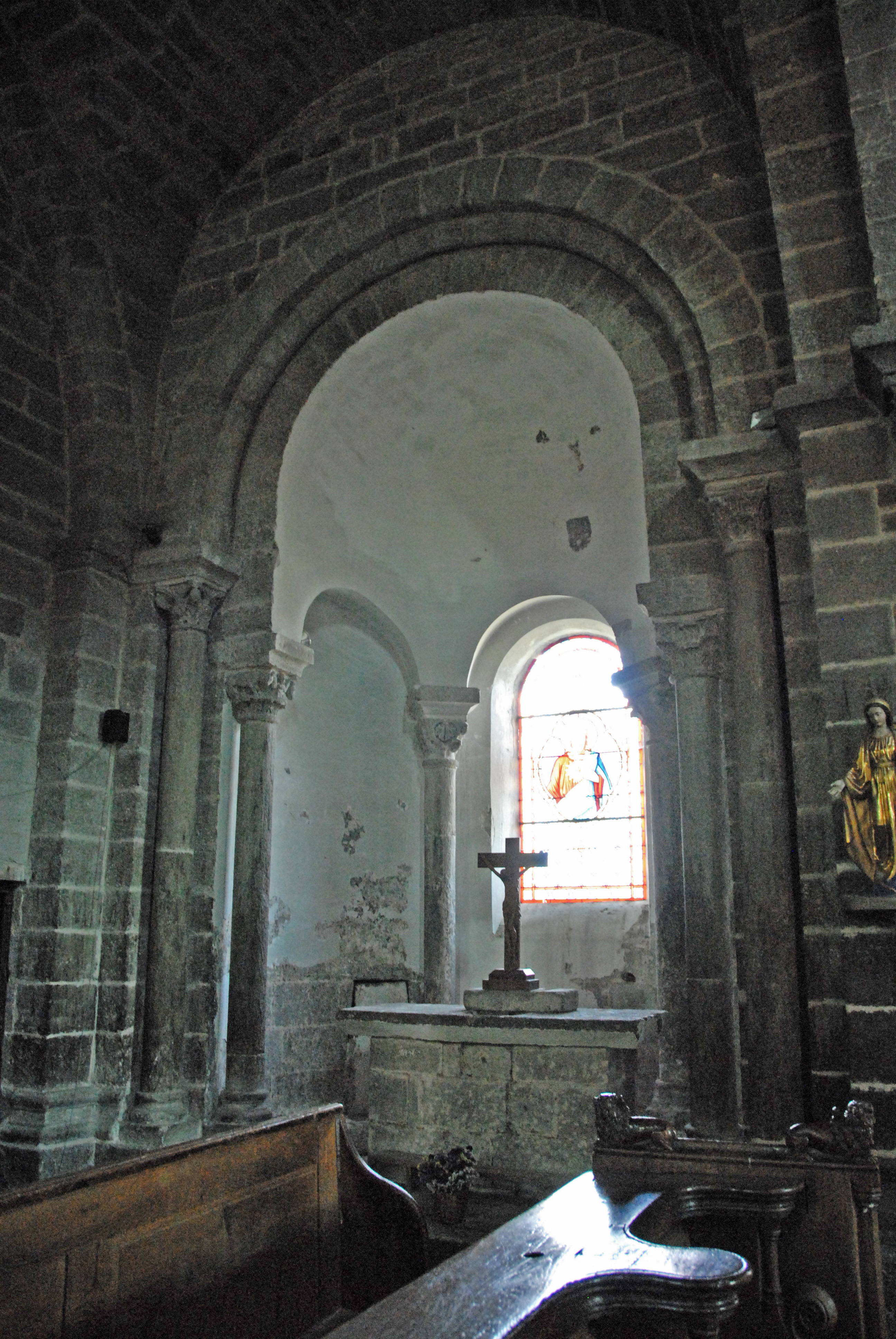 Chanteuges, Kirche, nördl. Kapellenapsis